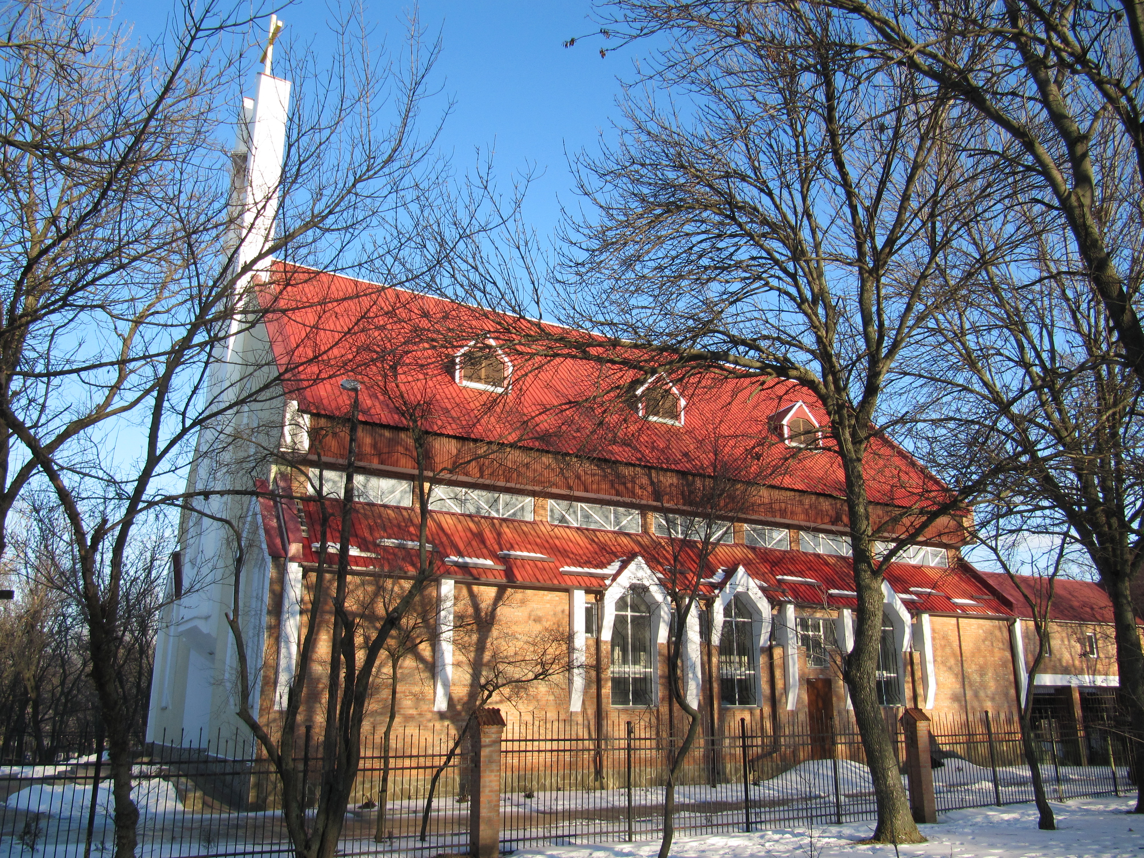 Католическая Церковь Тайной Вечери, Ростов-на-Дону